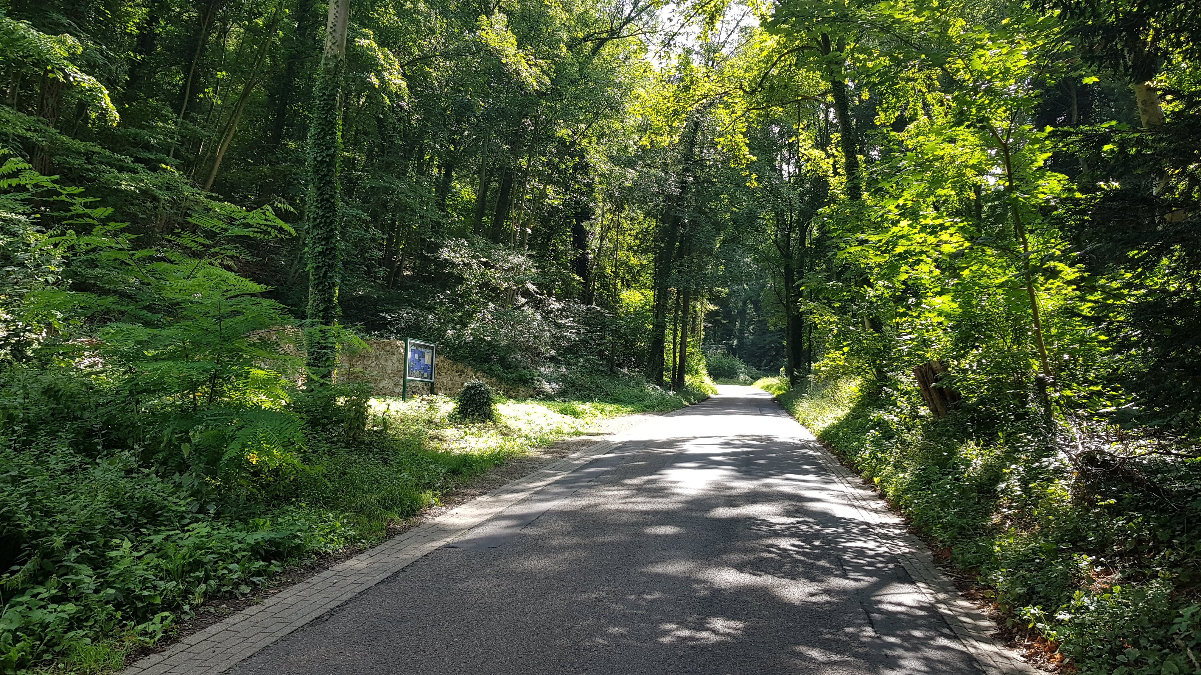 Brakkeberg, Geulhem, Nederland